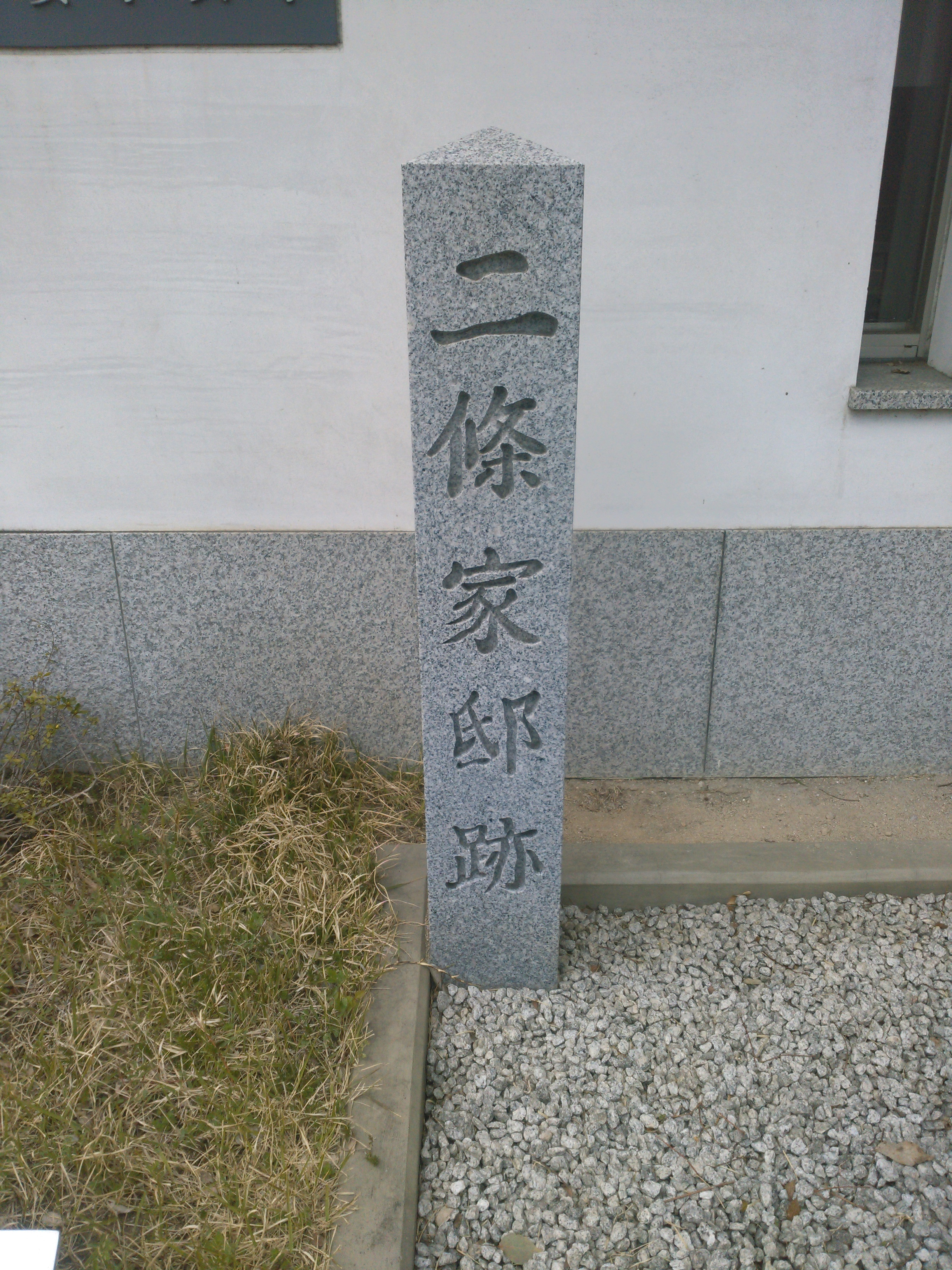 二條家邸跡石碑（京都市上京区）